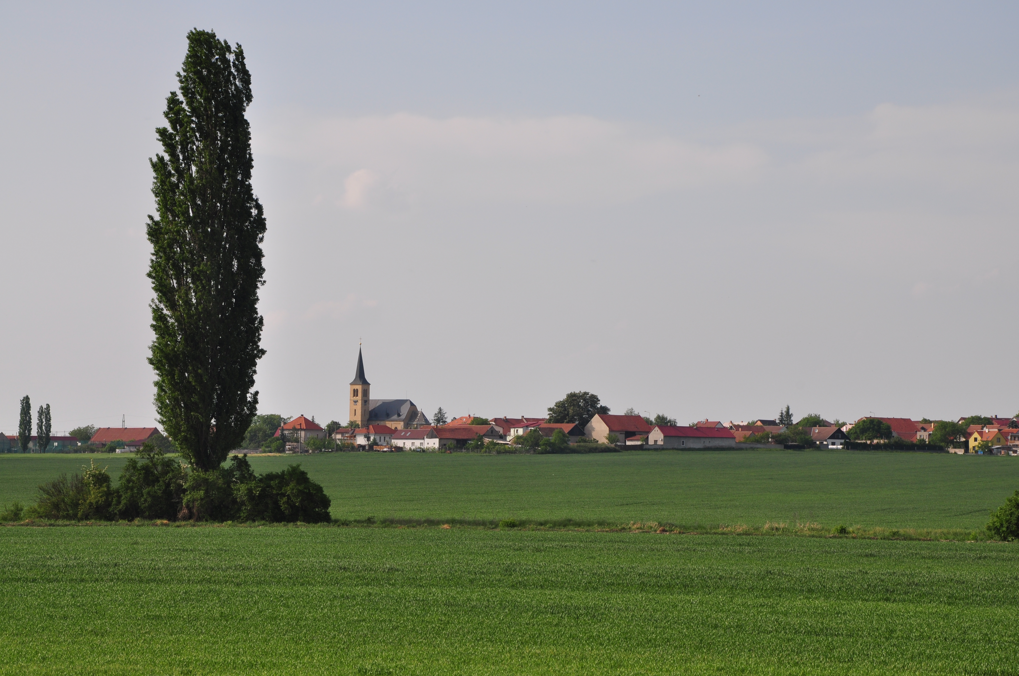 Pohled z vlaku Kolínské řepařské drážky (Kolín-Sedražice) na Ovčáry s kostelem svatého Jakuba Většího.